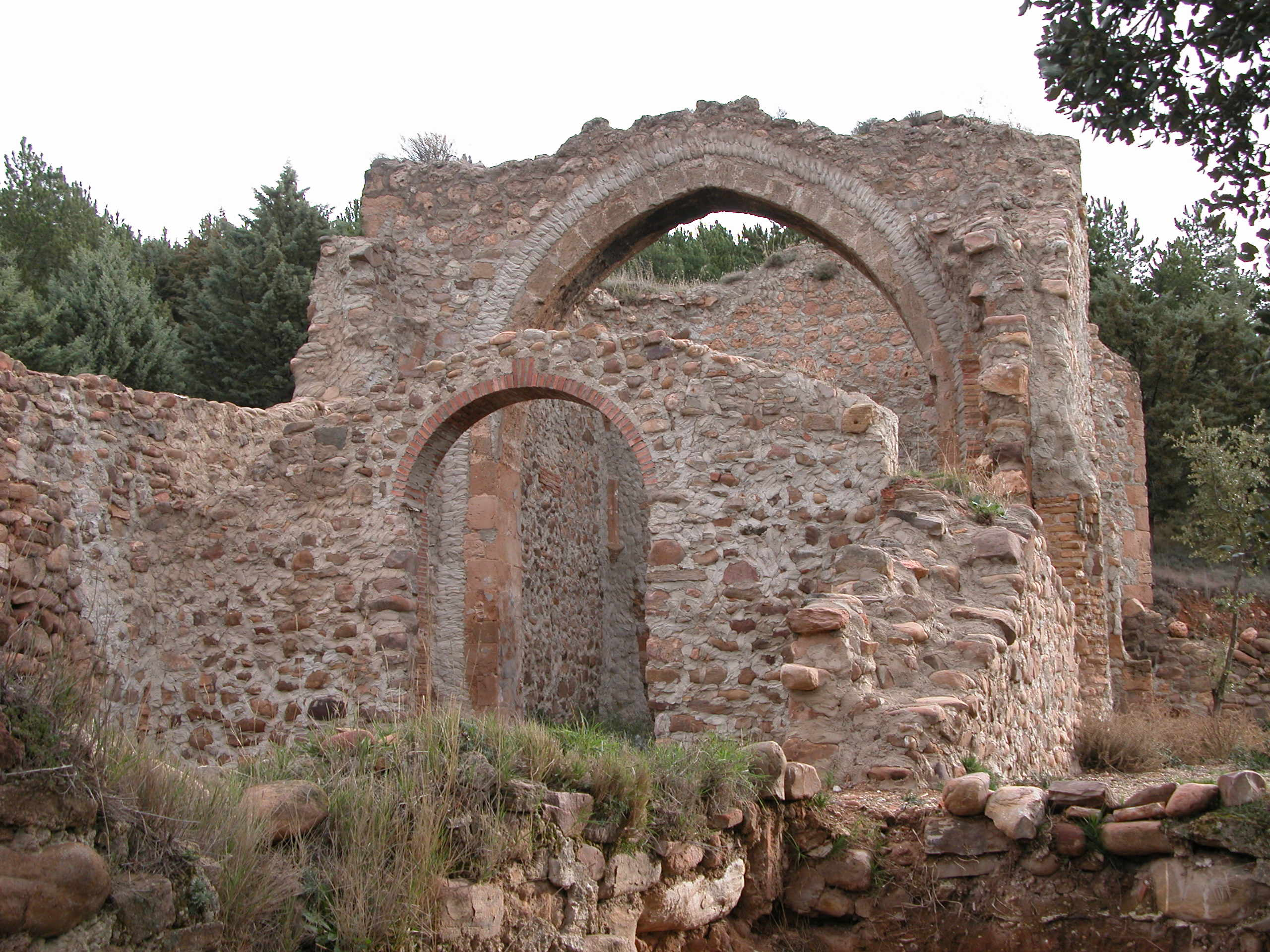 Ruinas del Monasterio de Santa María en Grávalos, La Rioja - España.